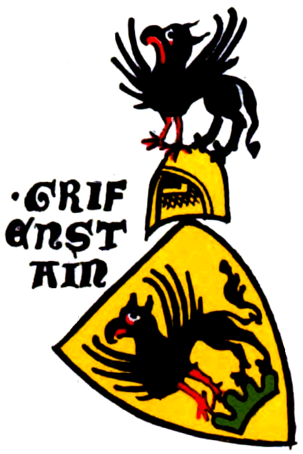 Wappen der Grifenstain (Greifenstein / Wildenberg)